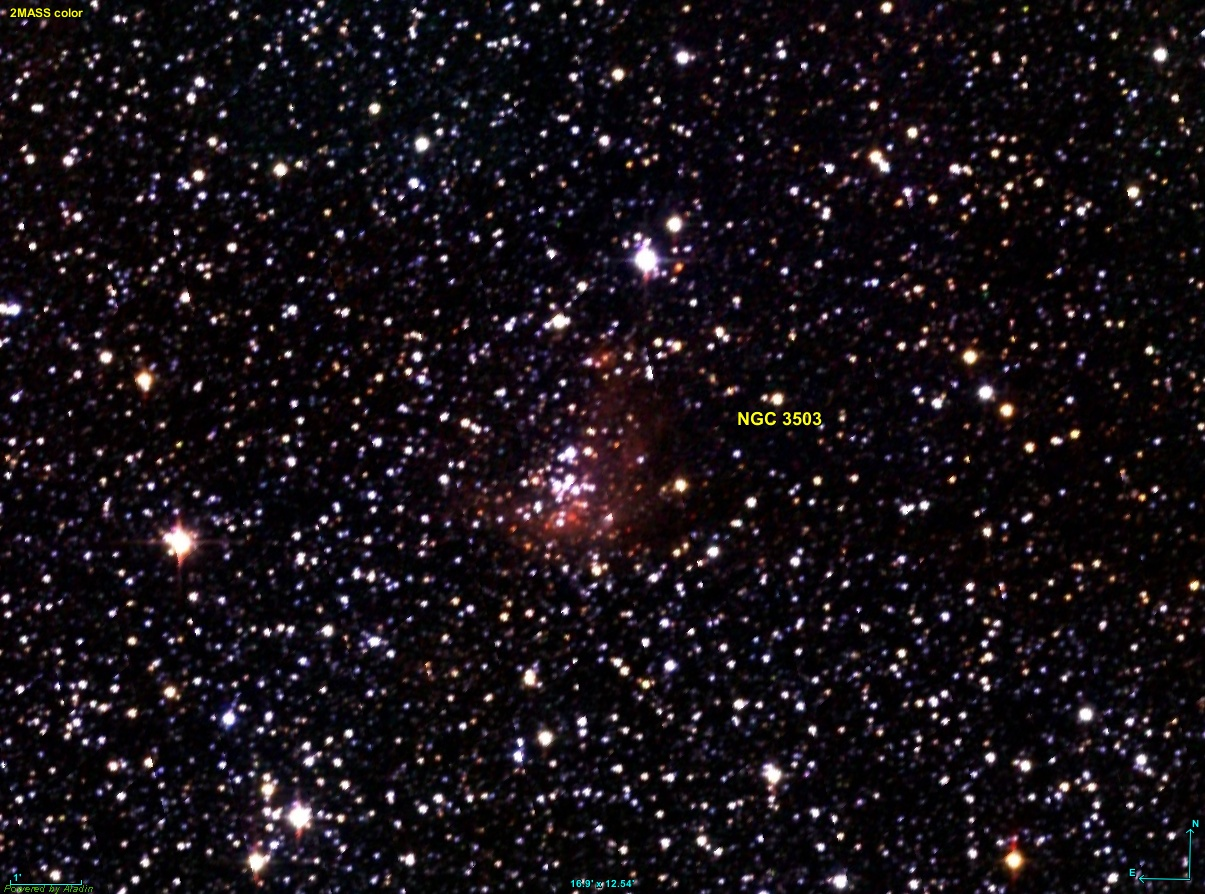 Image créée à l'aide du logiciel Aladin Sky Atlas du Centre de Données astronomiques de Strasbourg et des données publiques en format FIT de 2MASS (Two Microns All Sky Survey).